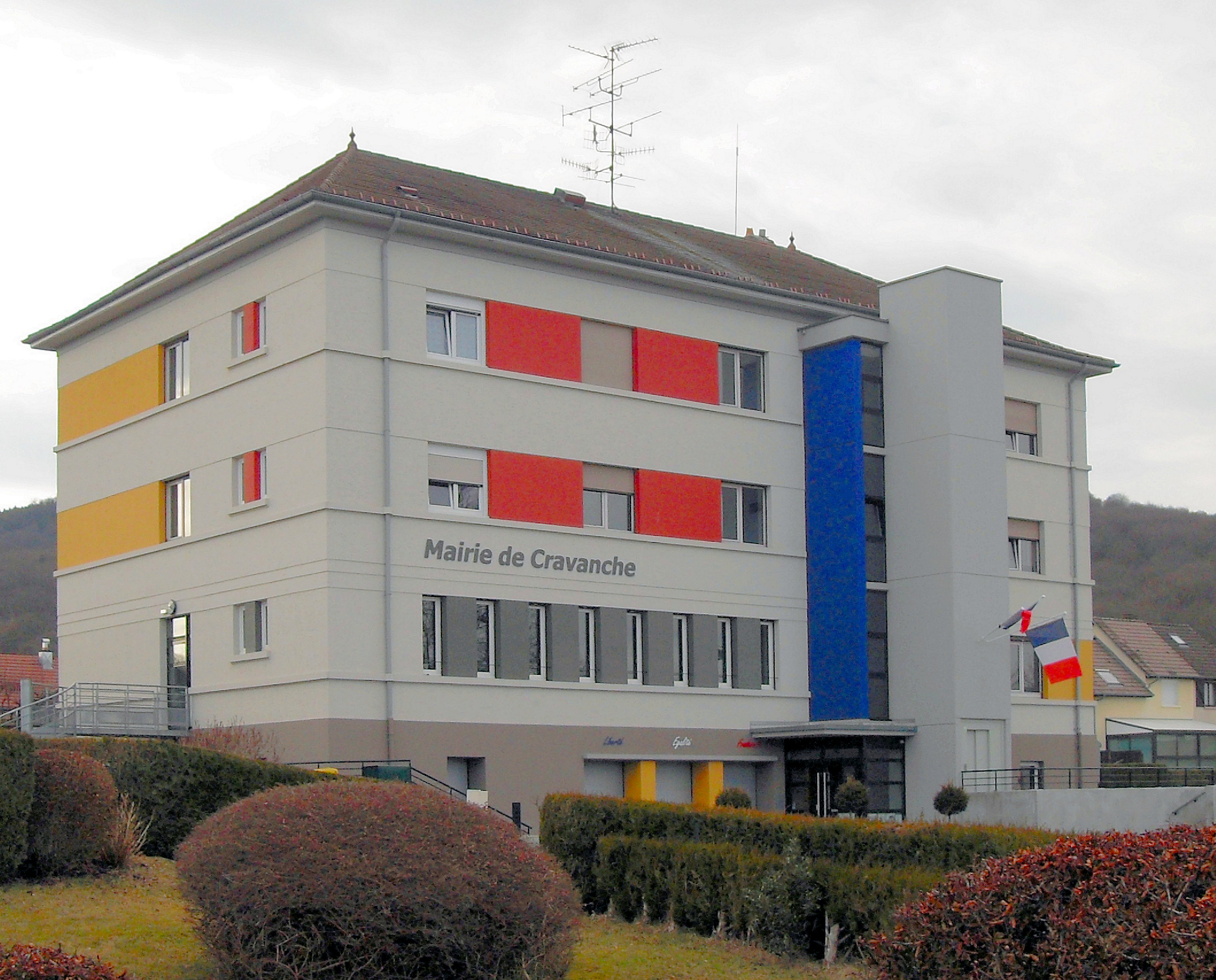 La mairie de Cravanche